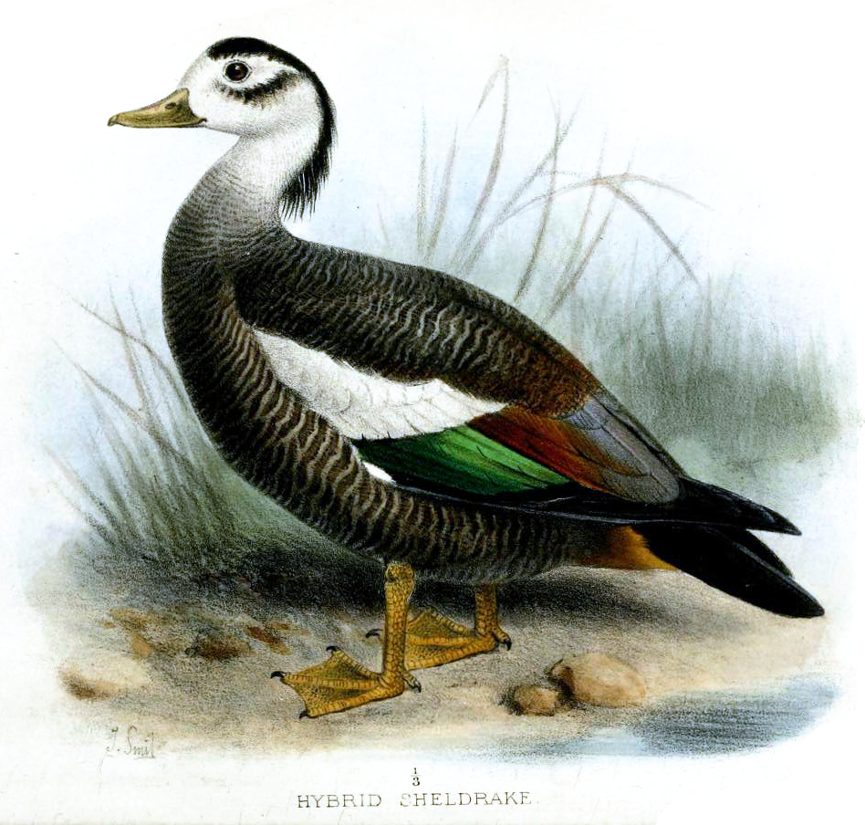 Hybrid duck - Tadorna casarca x Anas falcata (?)